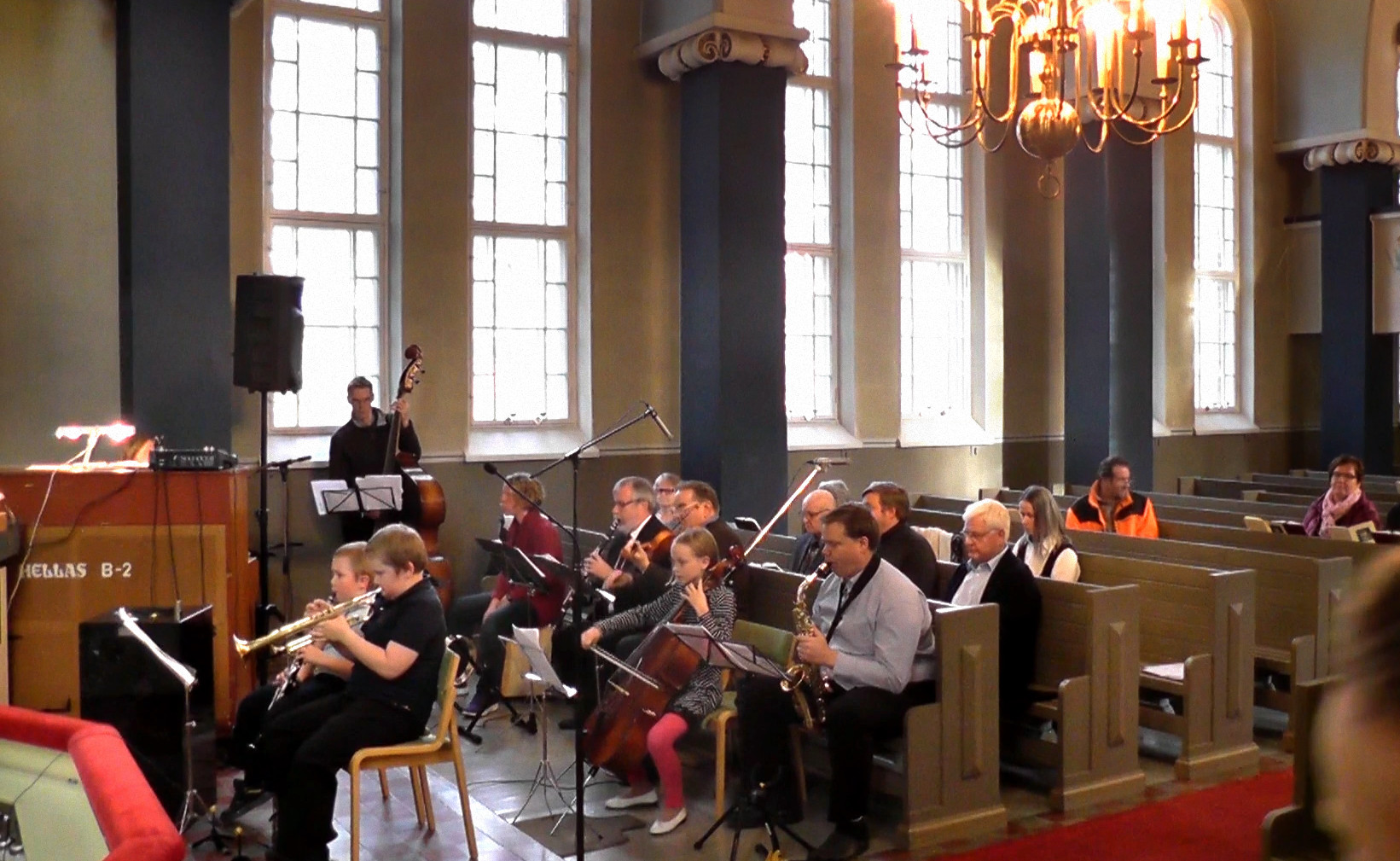 Tuomas-messu Ylämaan kirkossa 25.9.2016